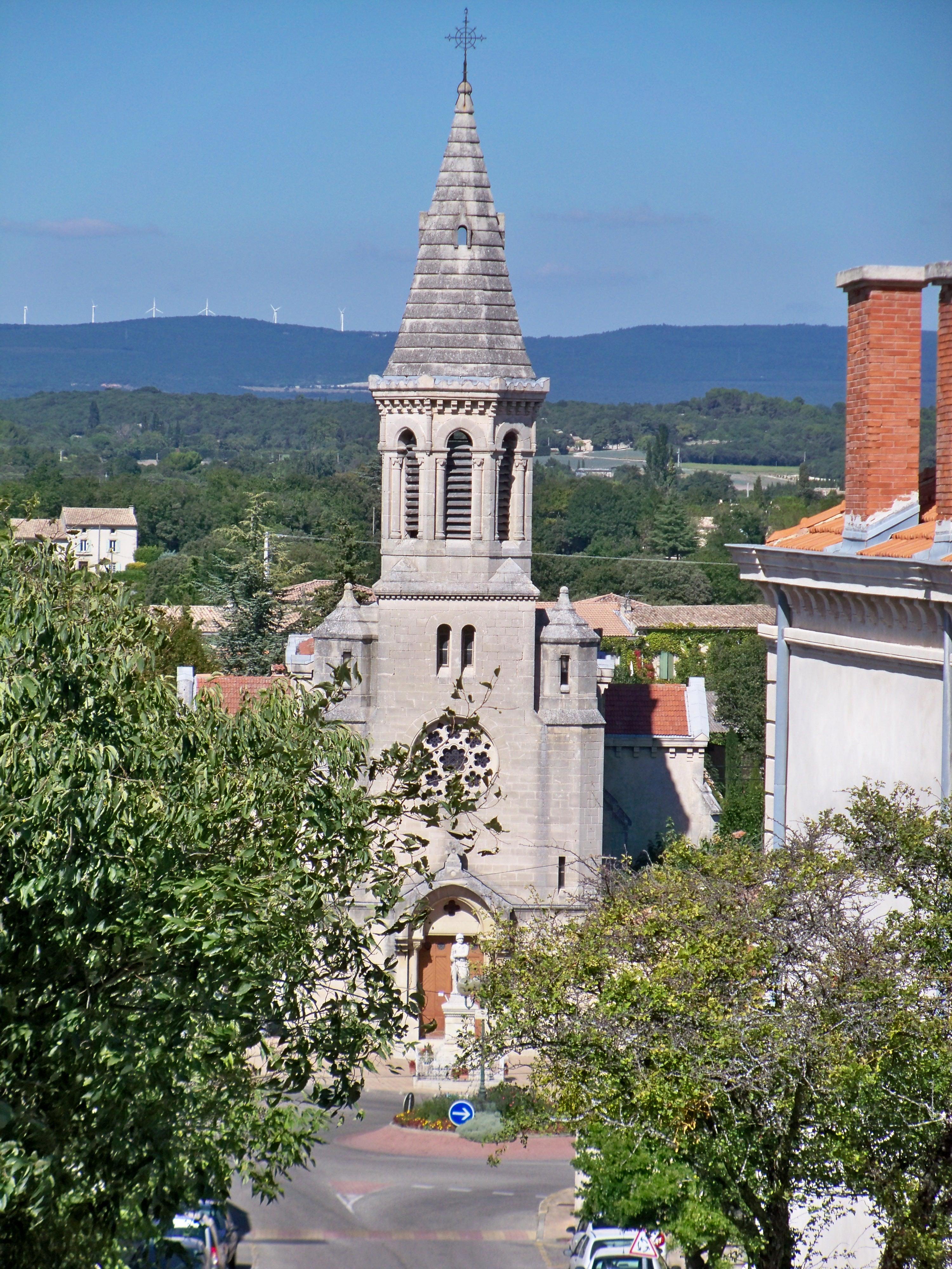 église de Montségur sur Lauzon